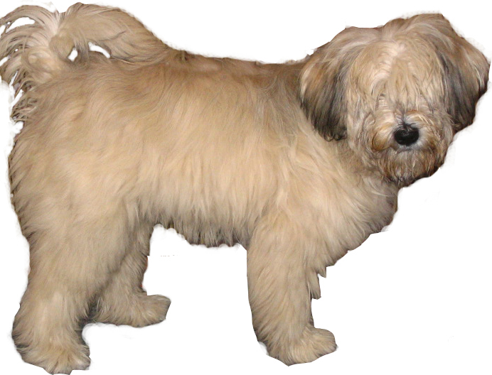 Tibetan Terrier